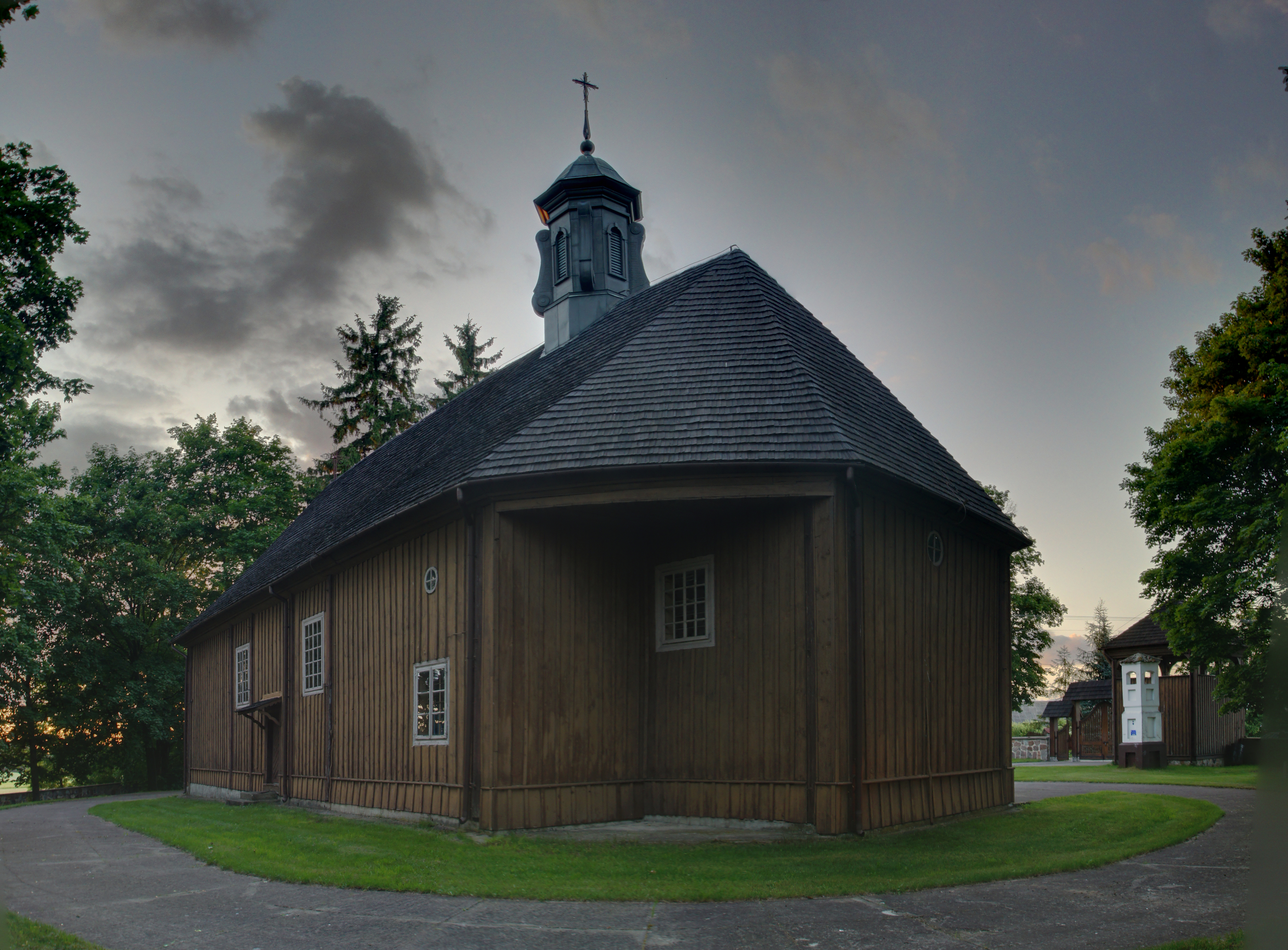 Miłkowice-Maćki, kościół par. p.w. św. Rocha, 1811